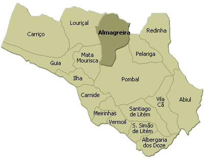 localisation de almagreira dans la freguesia de pombal